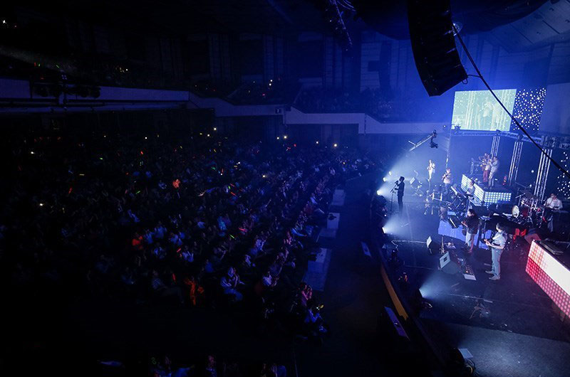 کنسرت محسن یگانه در سالن وزارت کشور